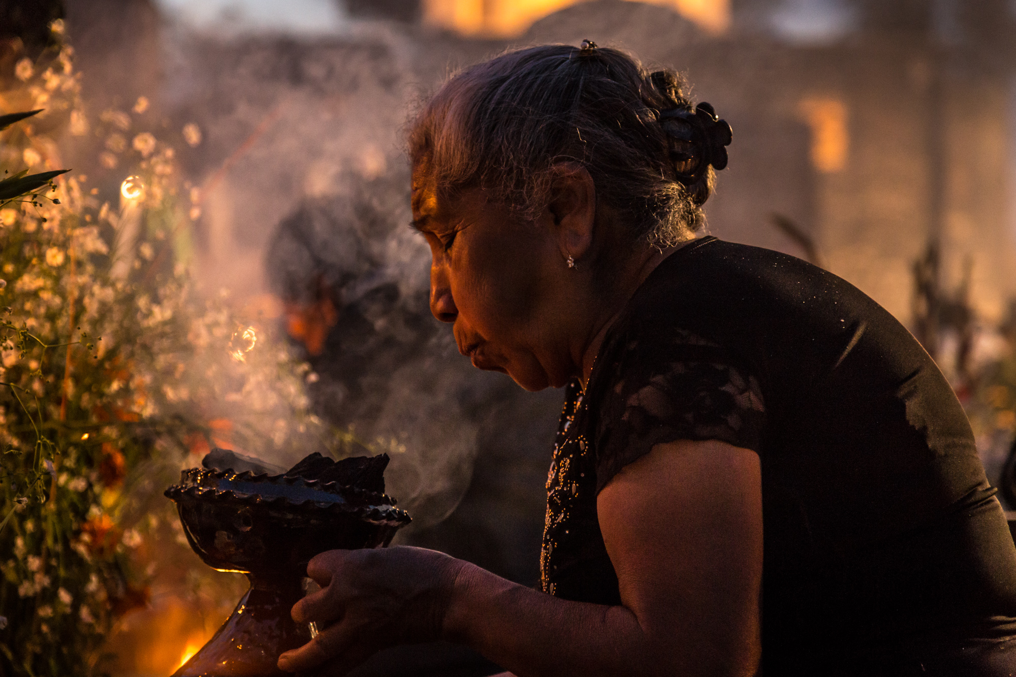 ¿Quién?: Habitantes del pueblo de Mixquic ¿Qué pasa?: Festival del Día de Muertos Lugar: Mixquic, Distrito Federal, México Tomada con Canon 6D y 24-105 f/4L